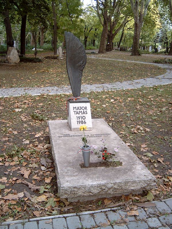 Major Tamás (Újpest, 1910. jan. 26. – Bp., 1986. ápr. 13.): színész, rendező, színigazgató, színészpedagógus sírja Budapesten. Kerepesi temető: 42/1-A-12 [szobrász: Beck András].